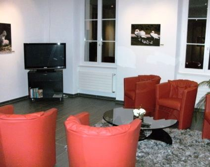 Centre de formation et de rencontre Bienenberg)